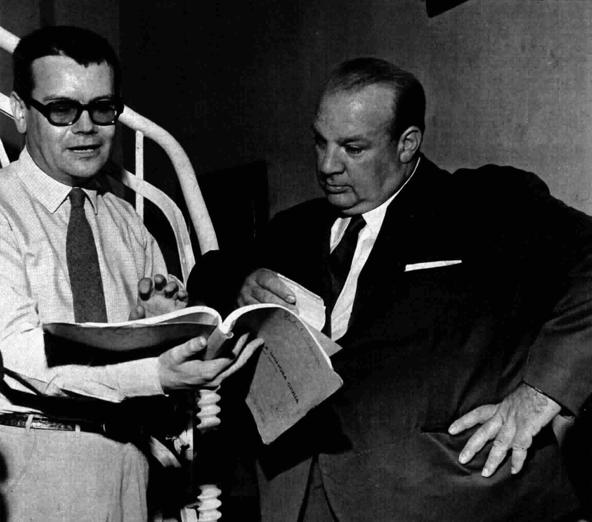 Italian director Massimo Scaglione and criminologist Tom Ponzi